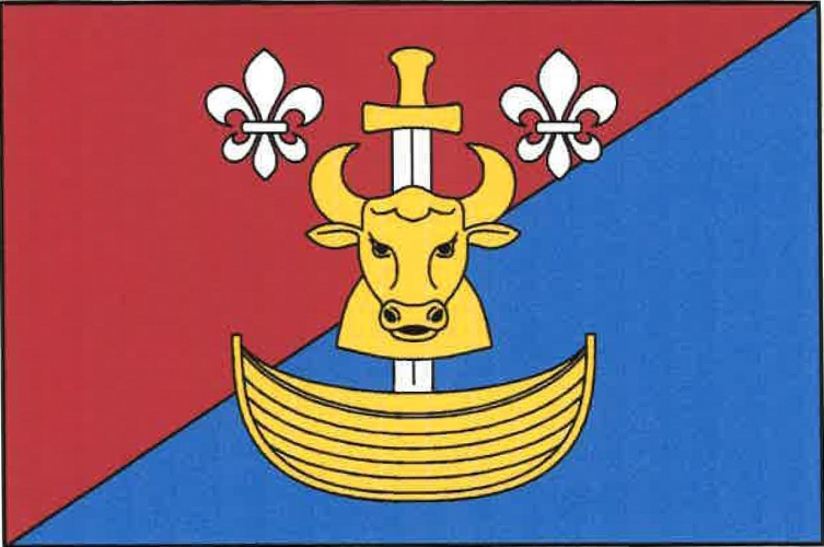 vlajka, Plaveč, okres Znojmo